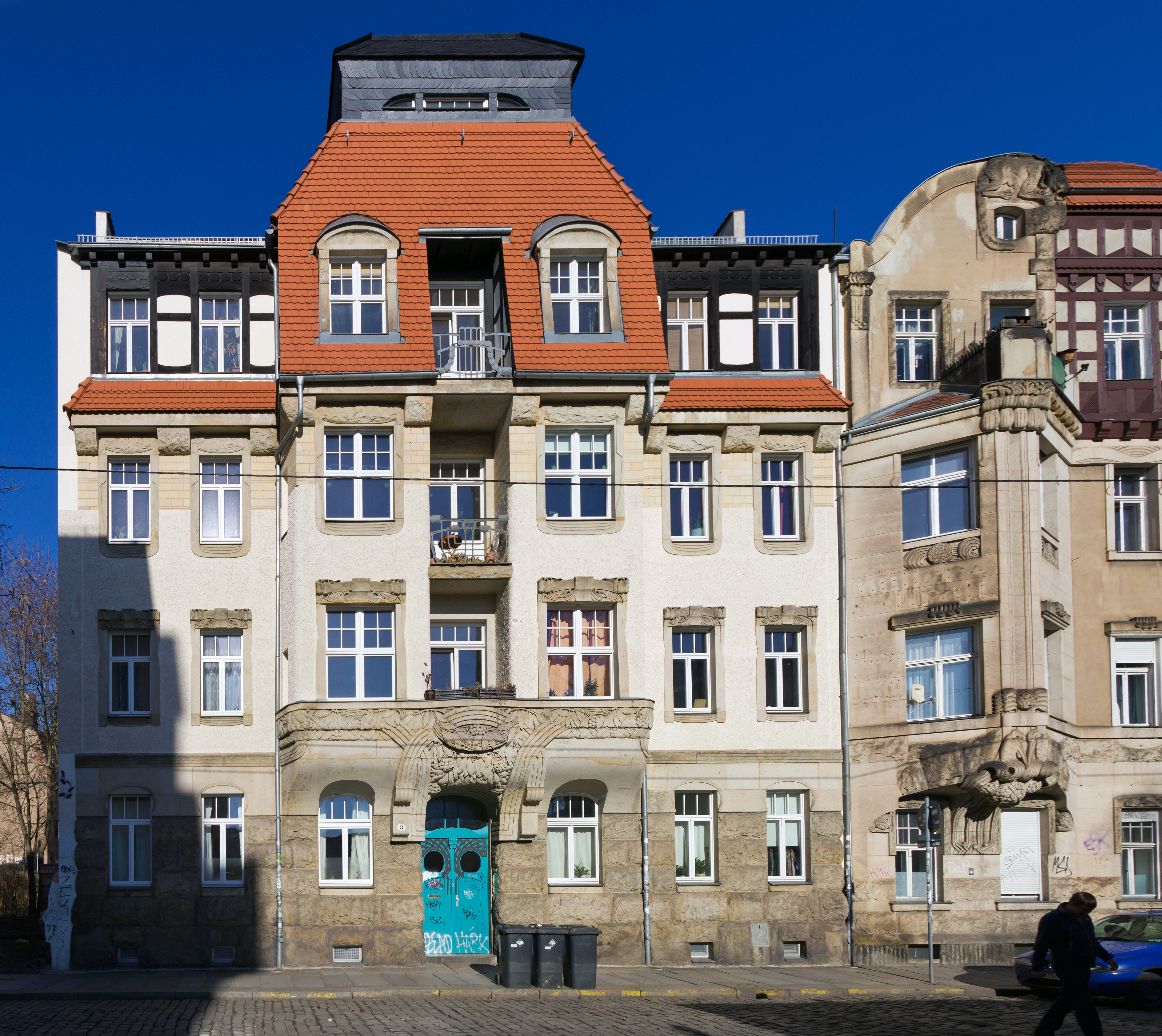 Katharinenstraße 3